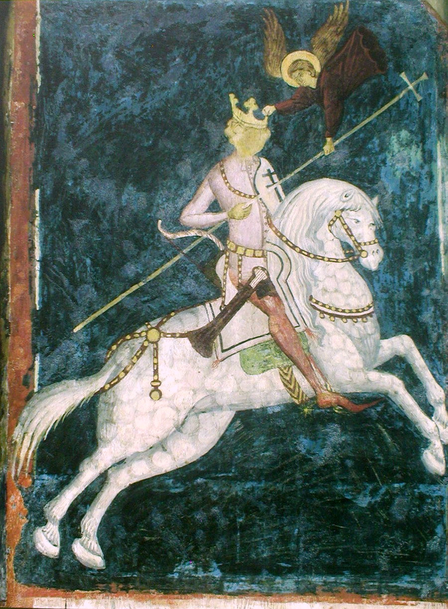 Ягайла на кані. Фрэска ў замкавай капліцы ў Любліне